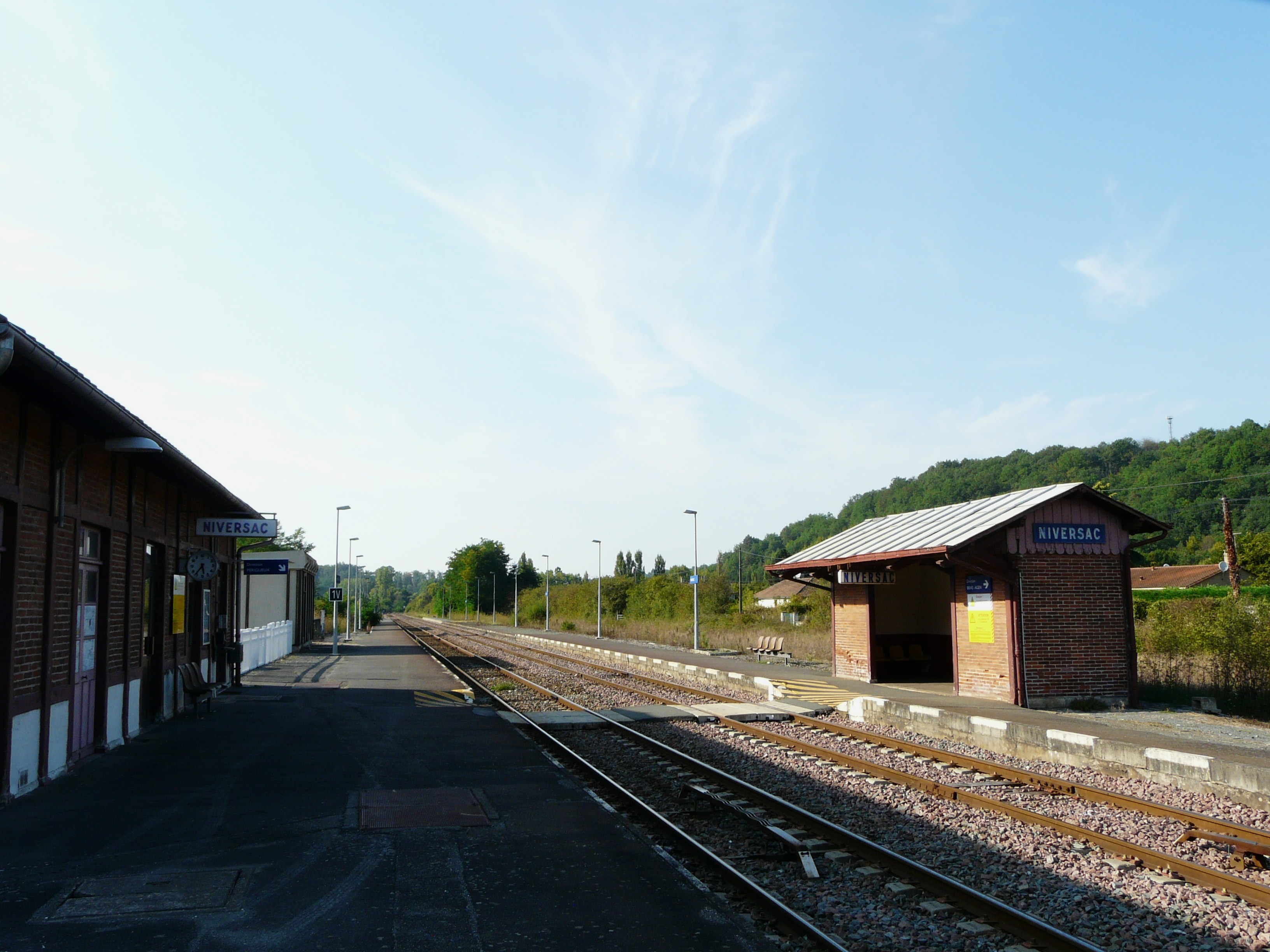 Les voies en gare de Niversac, Saint-Laurent-sur-Manoire, Dordogne, France. Vue prise en direction de Périgueux.